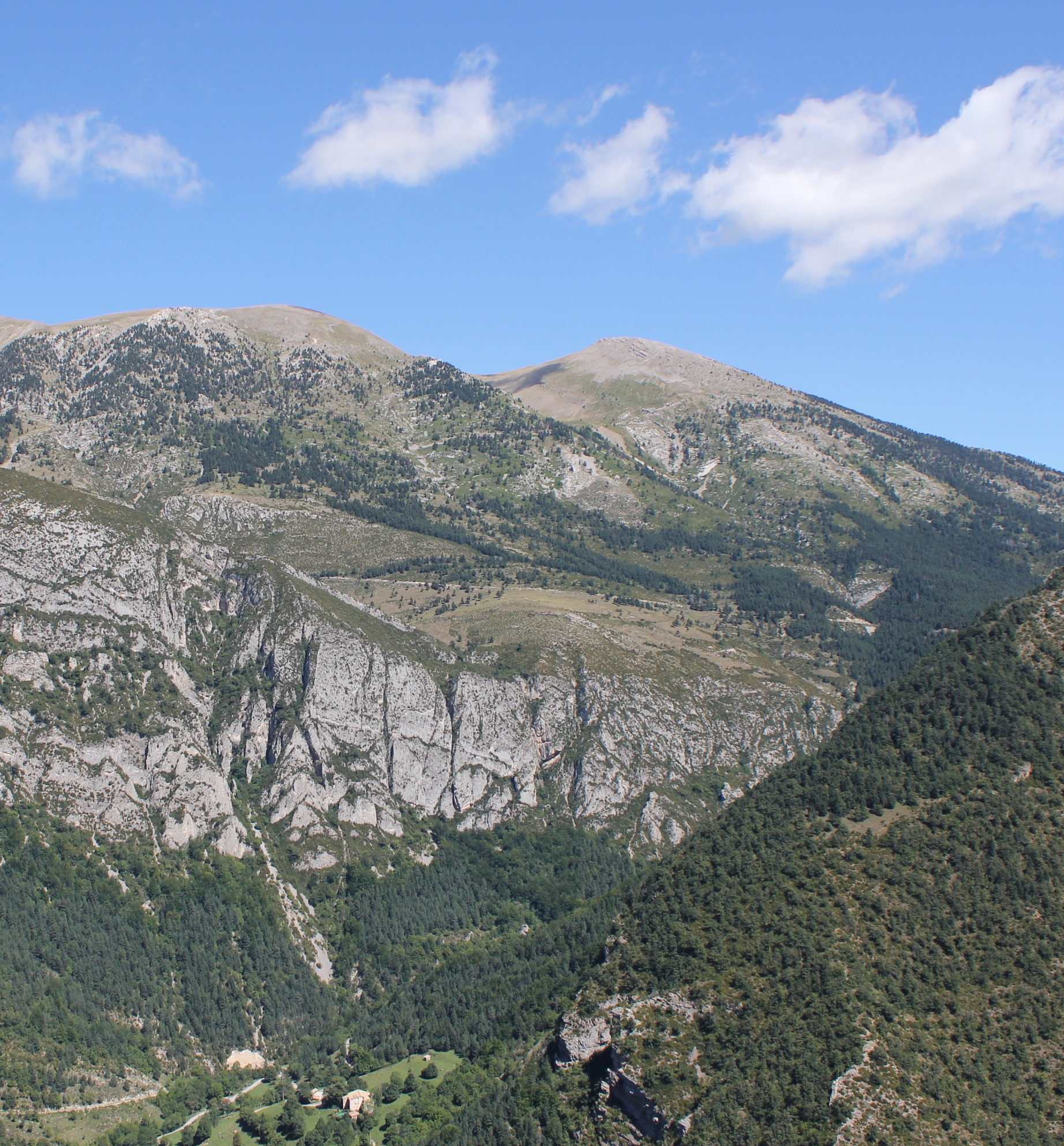 El Puig de Terrers a la dreta i el Comabona a l'esquerra. Vista des del Mirador de Gresolet